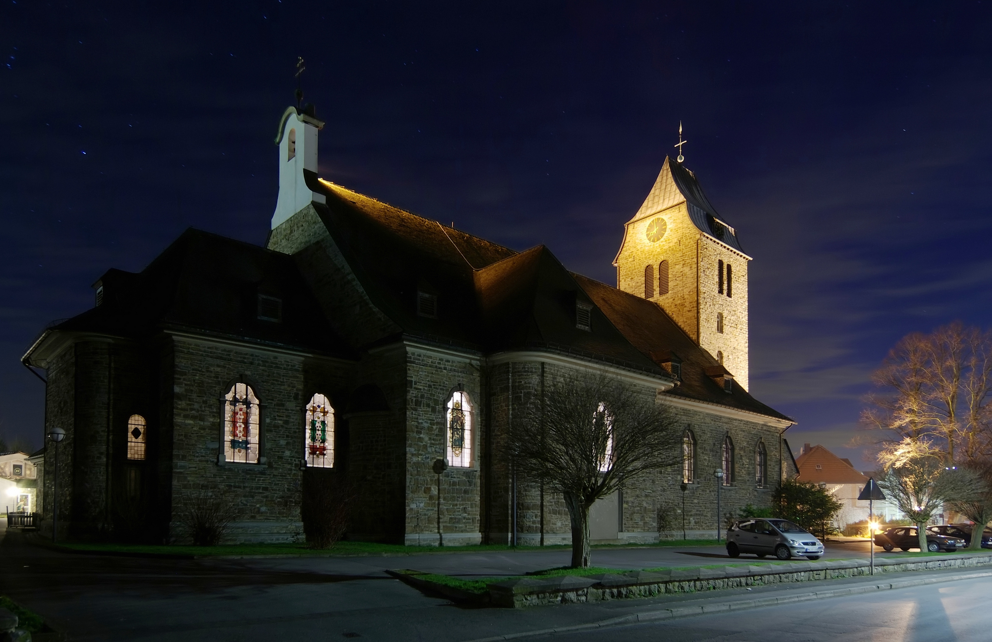 Katholische Kirche „St. Maria Magdalena“ in Menden-Bösperde/Holzen.